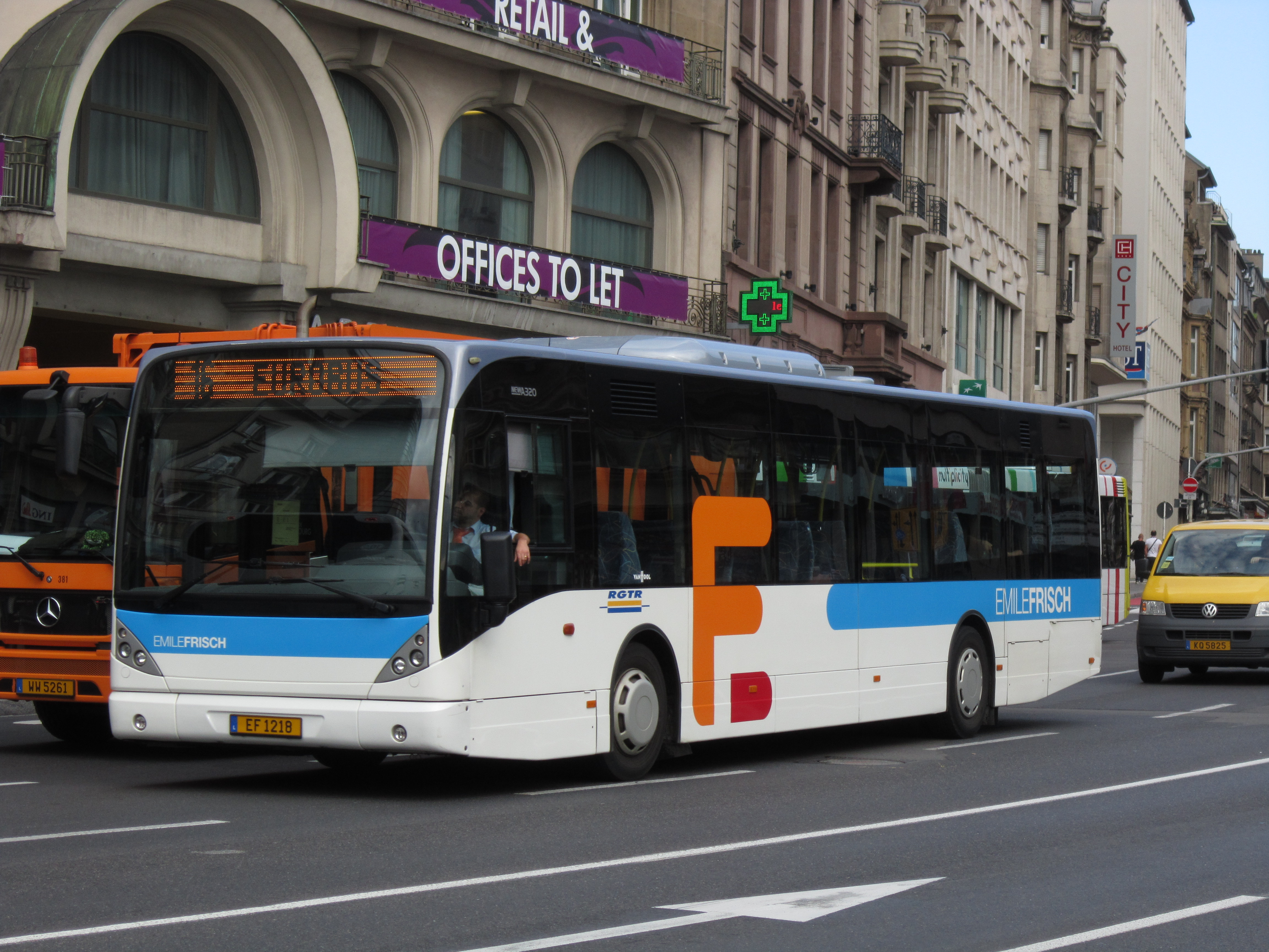 Autobus privé Van Hool New A 320 sur la ligne 16 à Luxembourg.